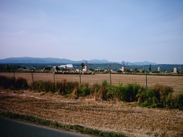 bales de palla en un camp de conreu, al fons hivernacles. Autor: Plàcid Pérez Bru.